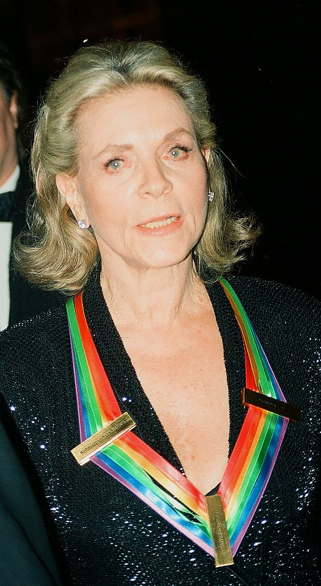 Wash D.C. 1997